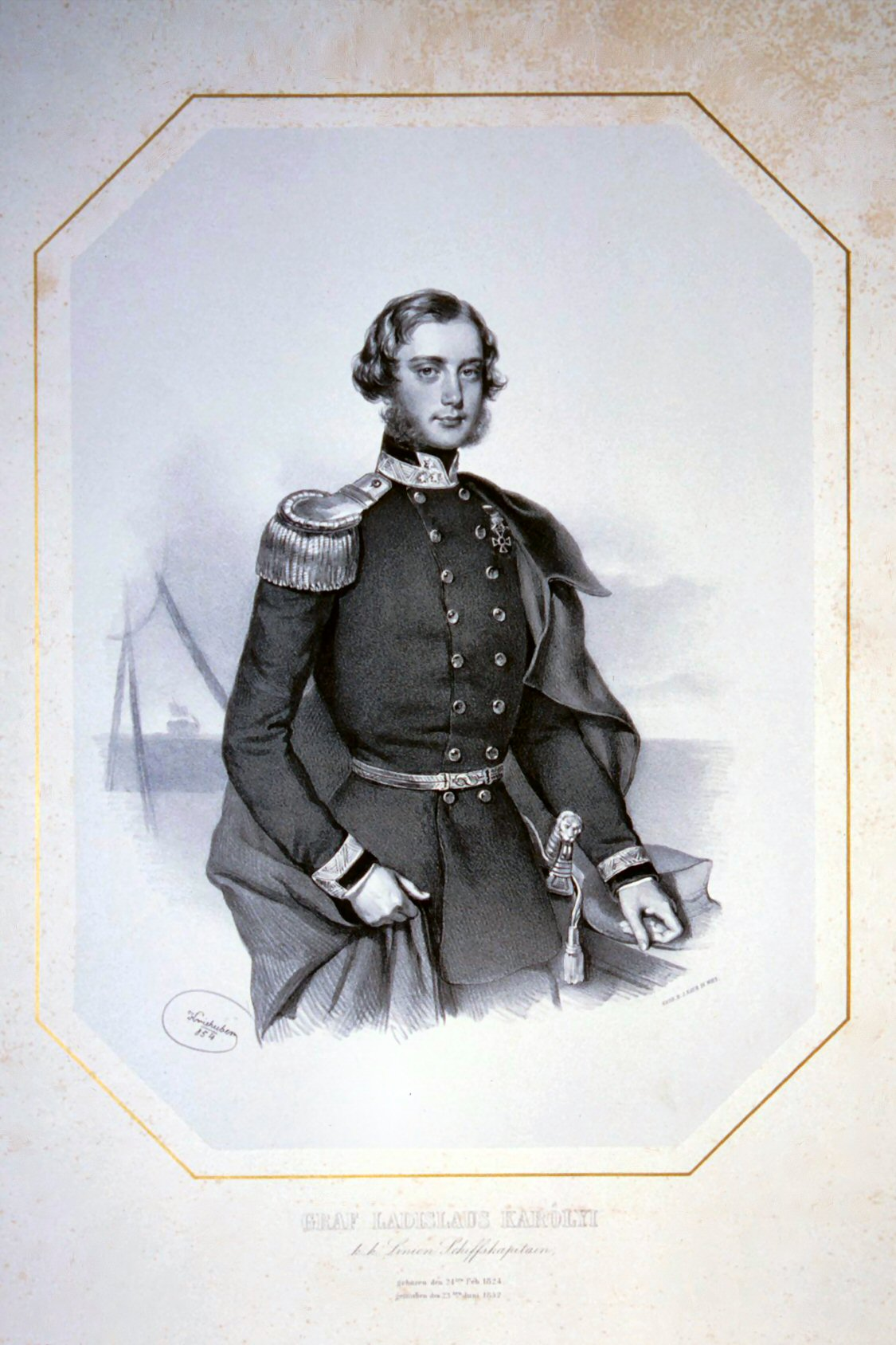 Ladislaus Graf Károlyi (1824-1852), k. k. Linienschiffkapitän, Kommandant der SMS Novara.